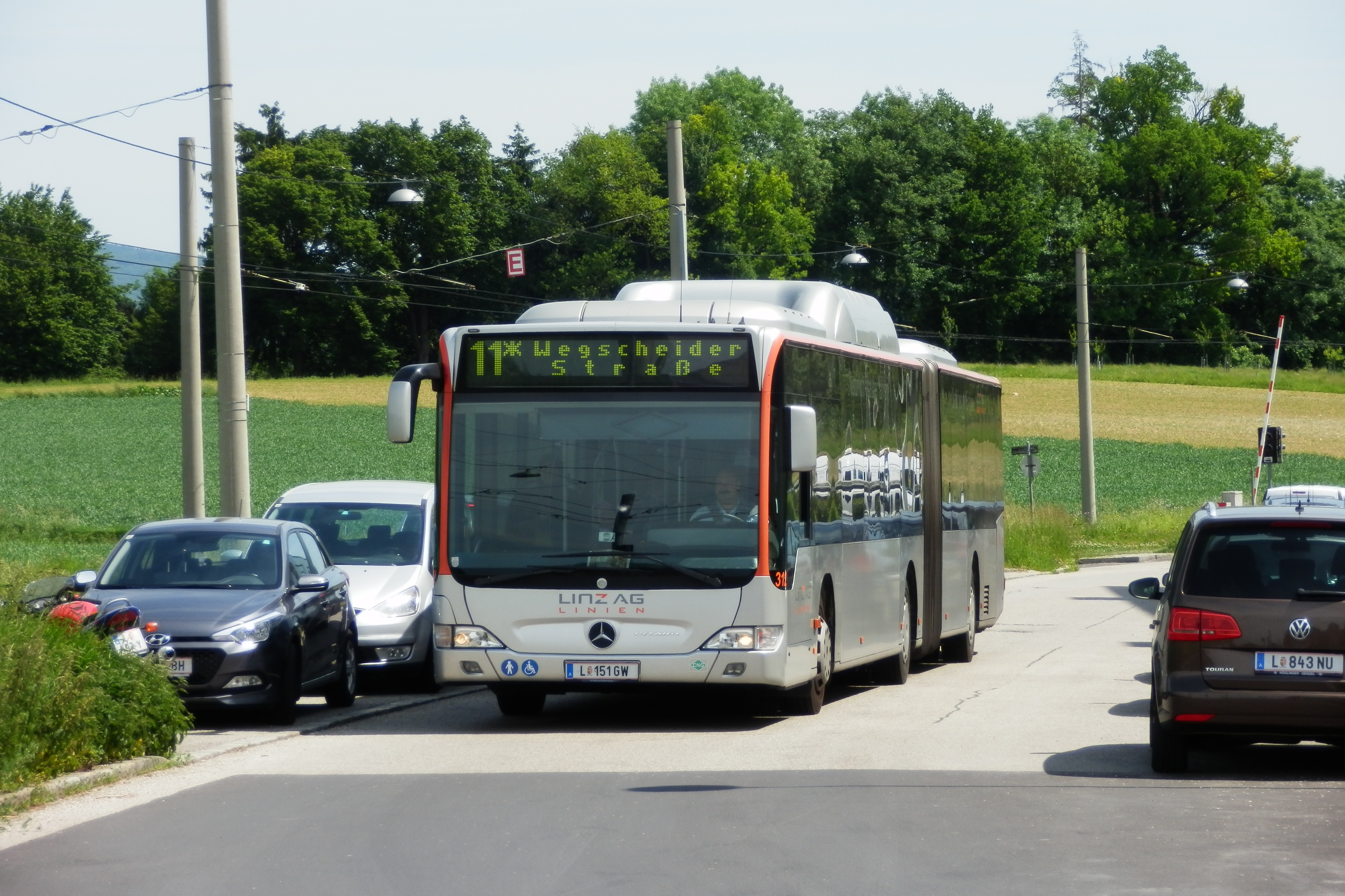 Linz AG Linien - Gelenkbus - Linie 11* in der Traundorfer Straße beim Ebelsberger Schlossweg